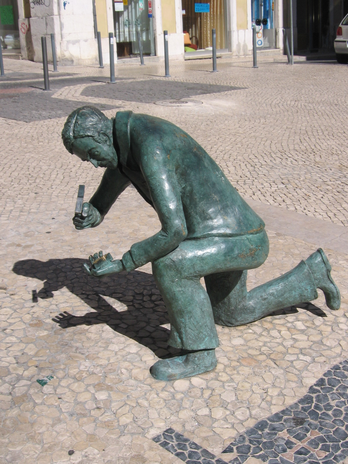 Monumento ao calceteiro do escultor Sérgio Stichini frente à igreja de São Nicolau, Baixa, Lisboa, Portugal